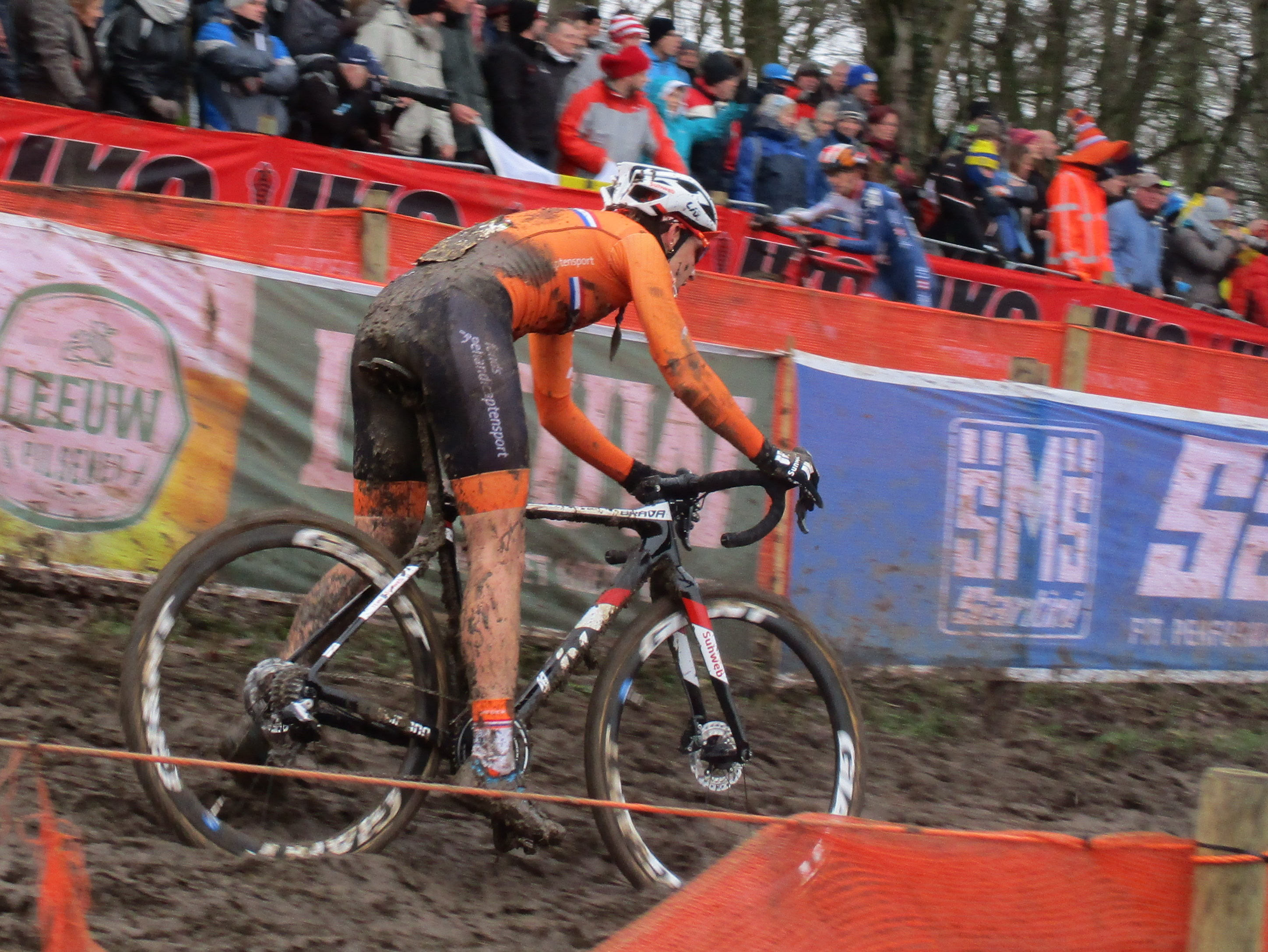 Wereldkampioenschappen Veldrijden op 3 en 4 februari 2018 op de Cauberg in Valkenburg, Limburg, Nederland. Wedstrijd van de vrouwen elite. Ronde 3 van 4.